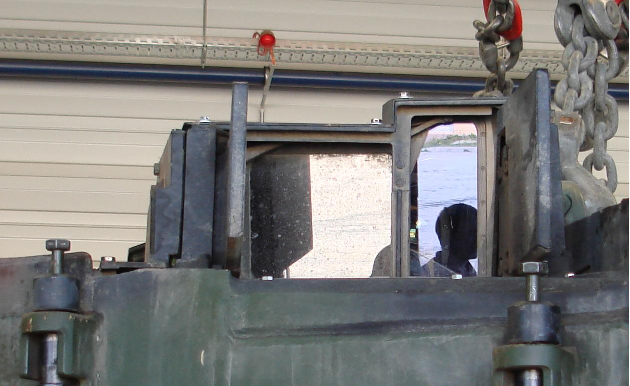 Ausblickgruppe des EMES 15 am Kampfpanzer Leopard 2A5. In Blickrichtung links befindet sich das Wärmebildgerät, rechts der Laserentfernungsmesser und der Ausblick des Tagsichtkanal.